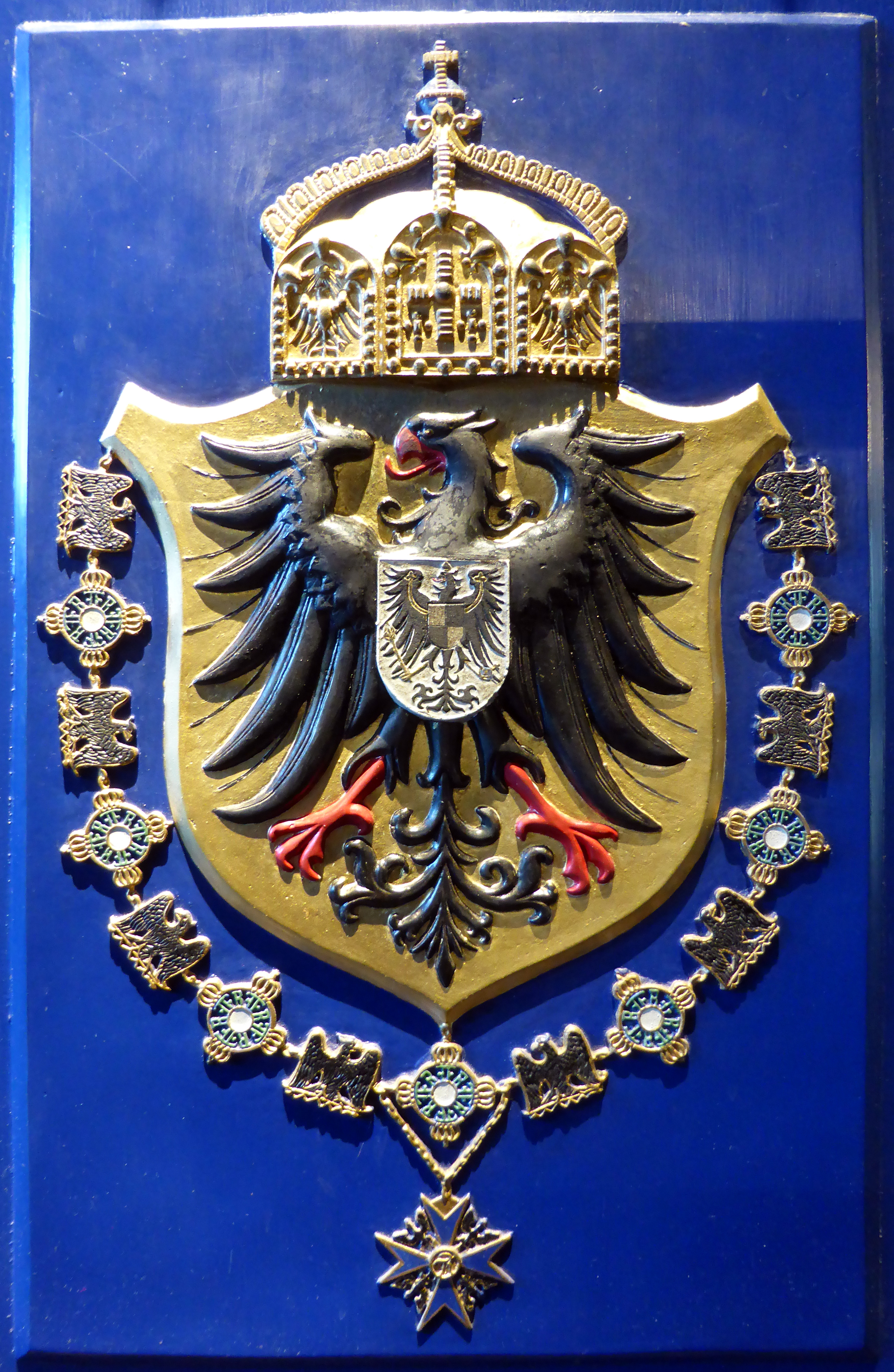 Hofzug Kaiser Wilhelms II., Baujahr 1888. Breslauer Aktiengesellschaft für Eisenbahnwagenbau. Ausgestellt im Deutschen Technikmuseum in Berlin. Wikipedianische KulTour am 10. Oktober 2015 in der Ausstellung des Museums.